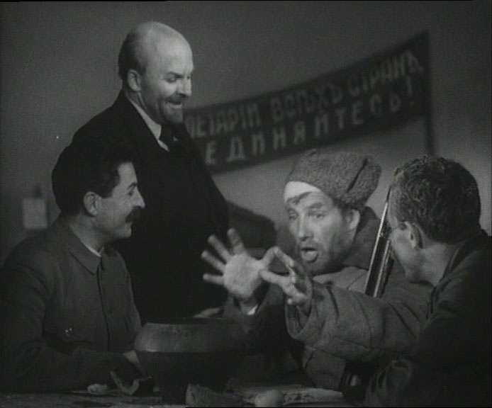 Борис Тенин (Шадрин), Максим Штраух (Ленин), Михаил Геловани (Сталин) в к/ф "Человек с пужьём"